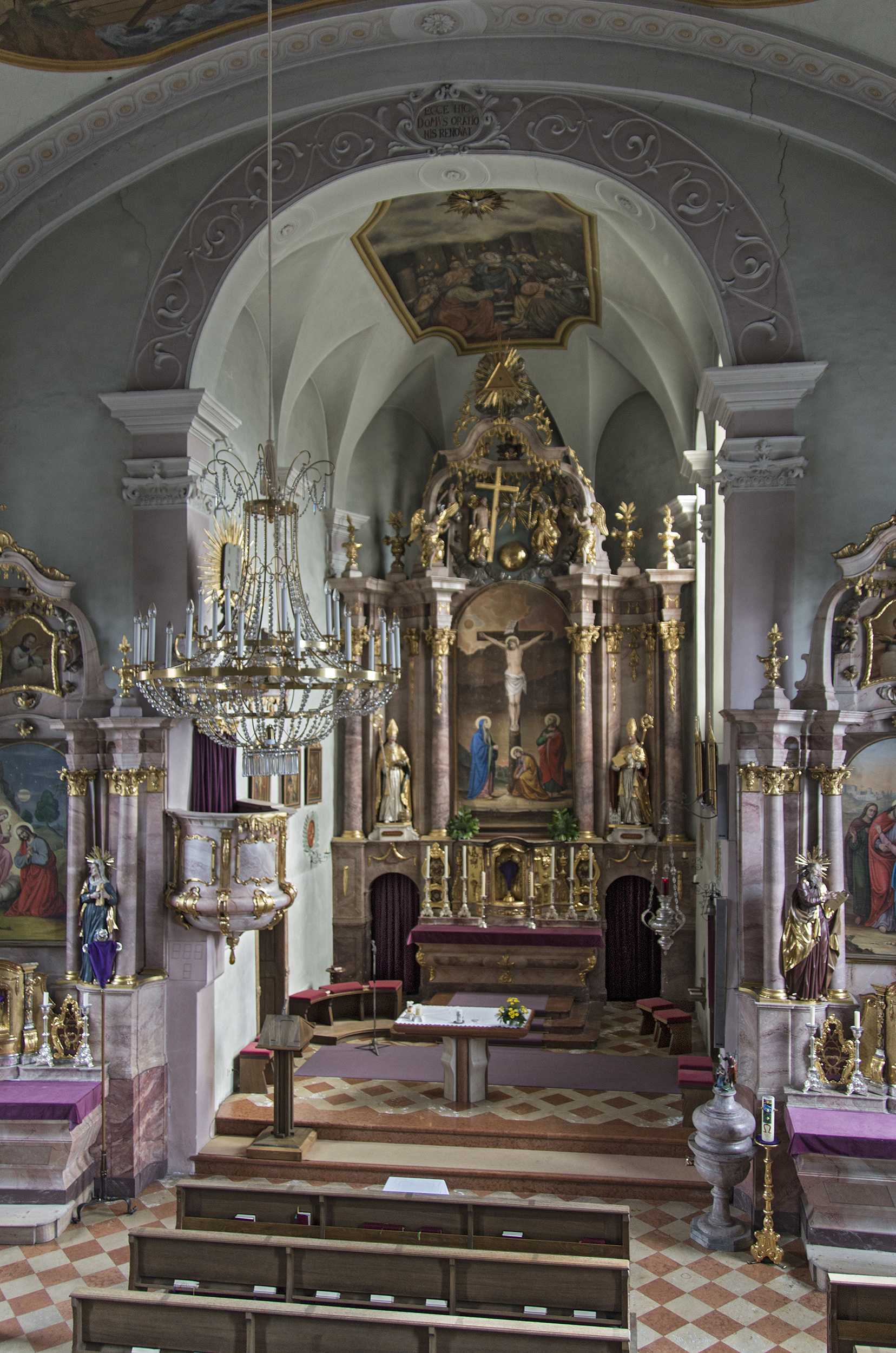 Kath. Pfarrkirche hl. Andreas und Friedhof mit Einsegnungshalle